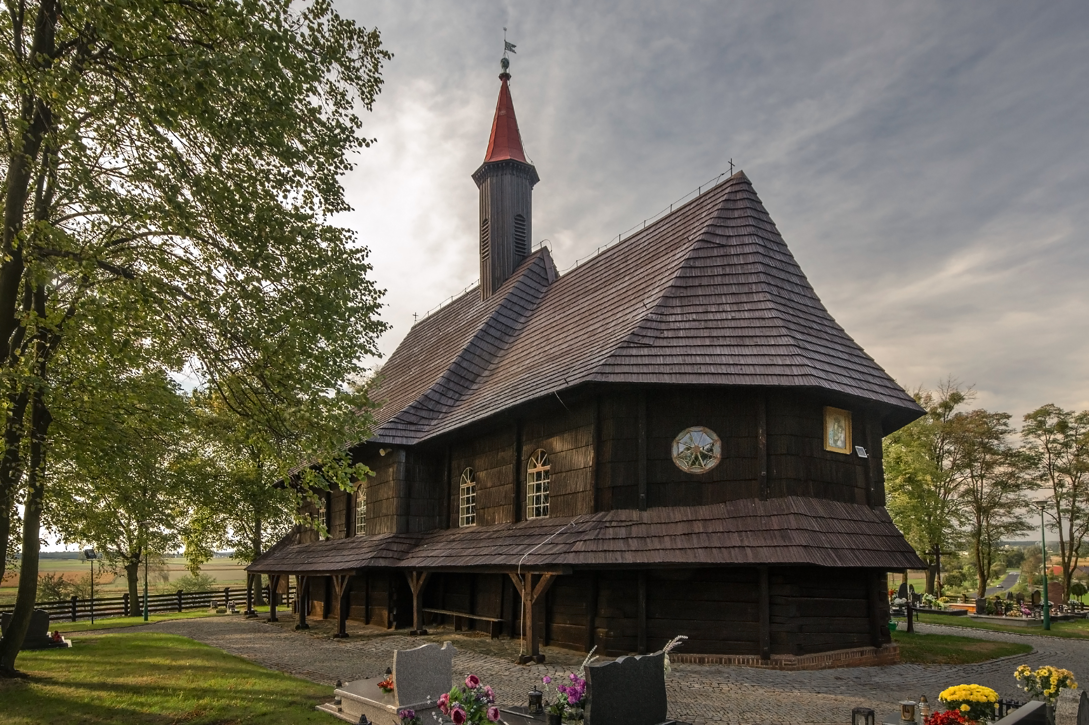 Grodzisko, kościół fil. pw. św. Rocha, 1710